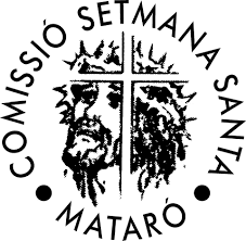 Logo comissió Setmana Santa Mataró